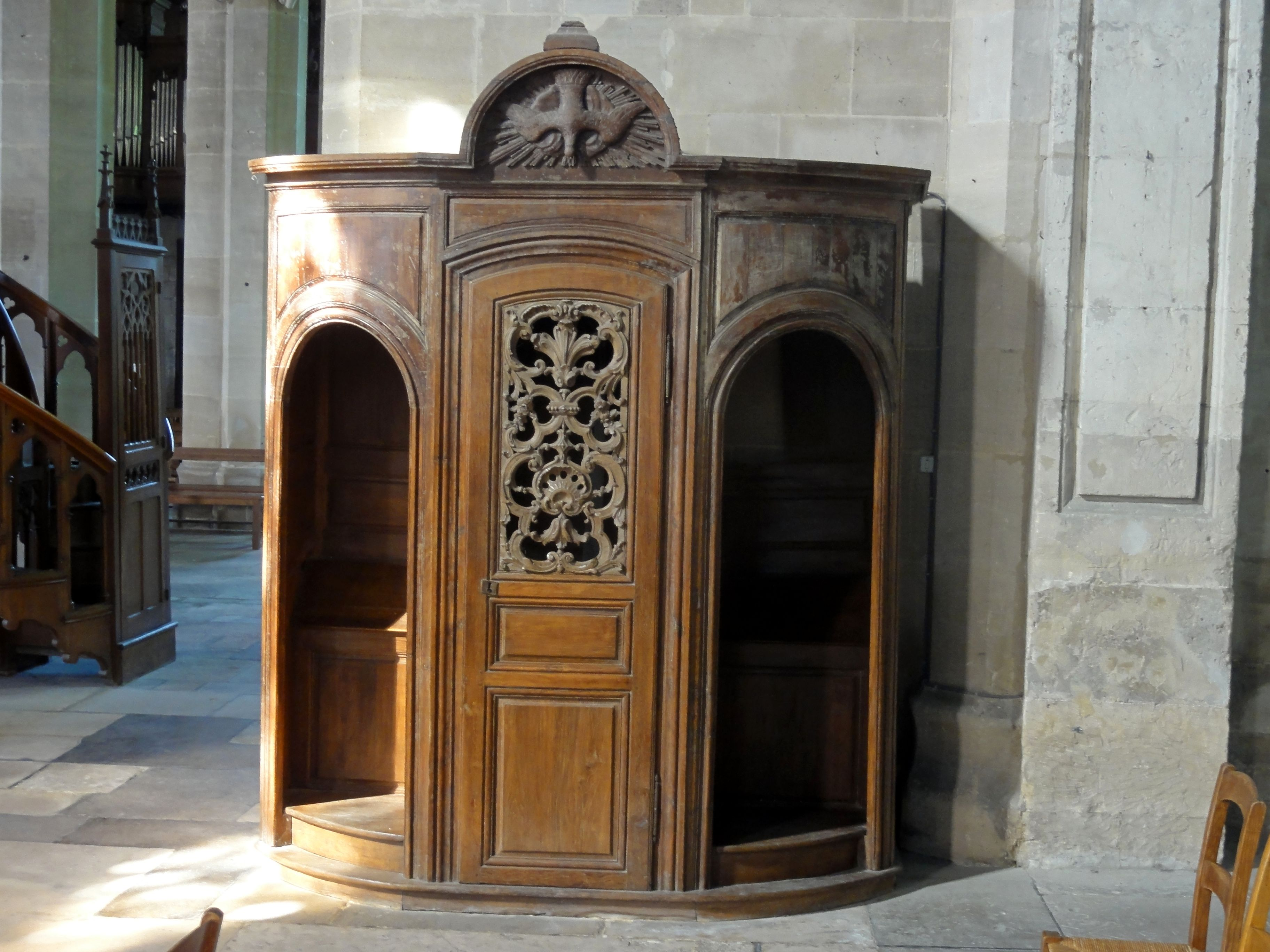 Confessional.